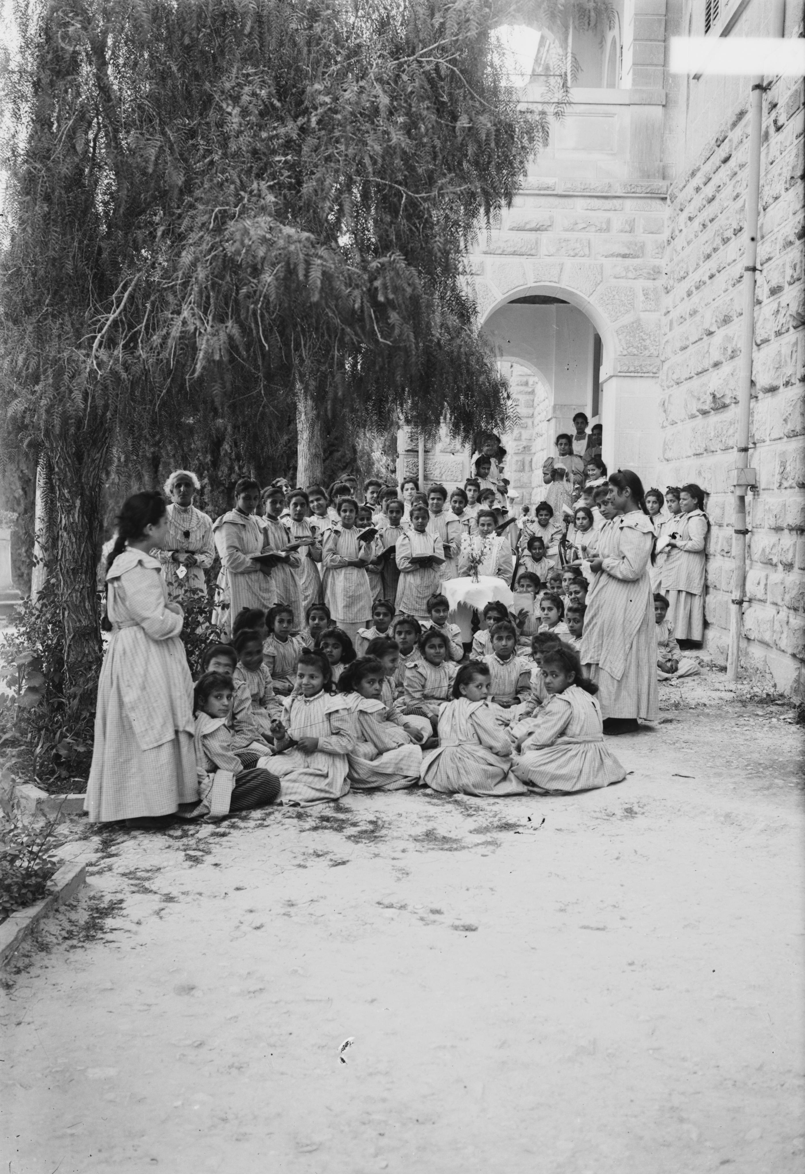 ילדות בחצר בית הספר לבנות של המיסיון האנגלי רחוב הנביאים ירושלים